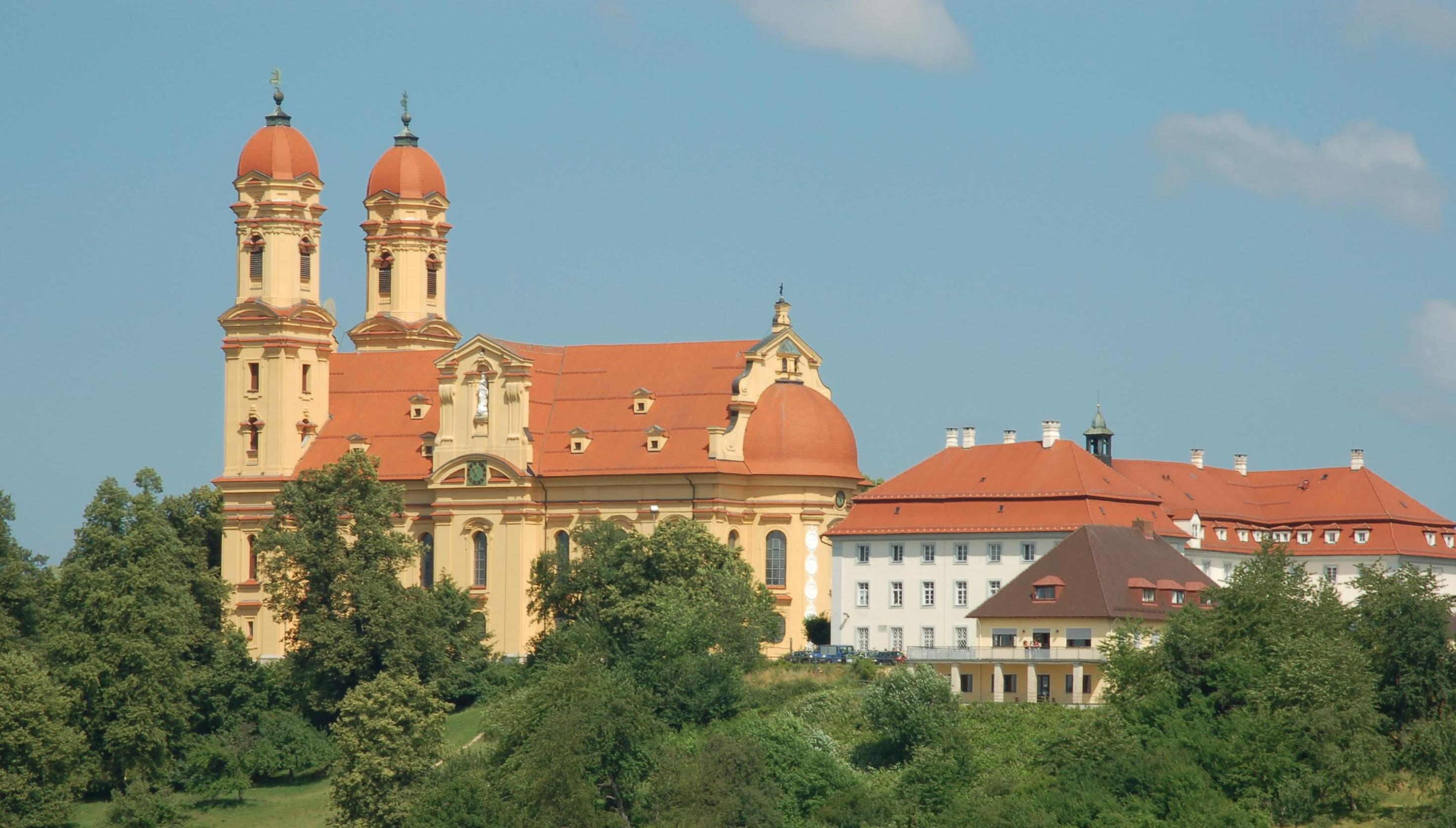 Blick auf die Schönenberg Kirche in Ellwangen von der Südseite.